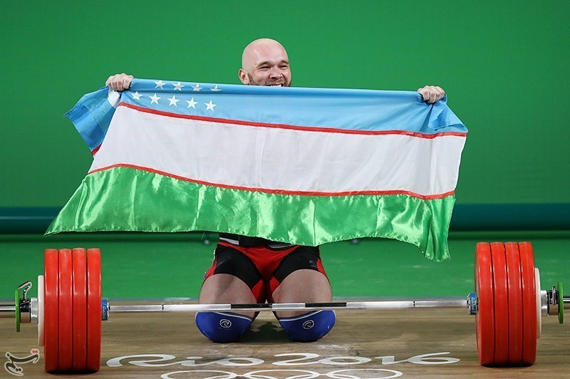 Weightlifting at the 2016 Summer Olympics – Men's 105 kg